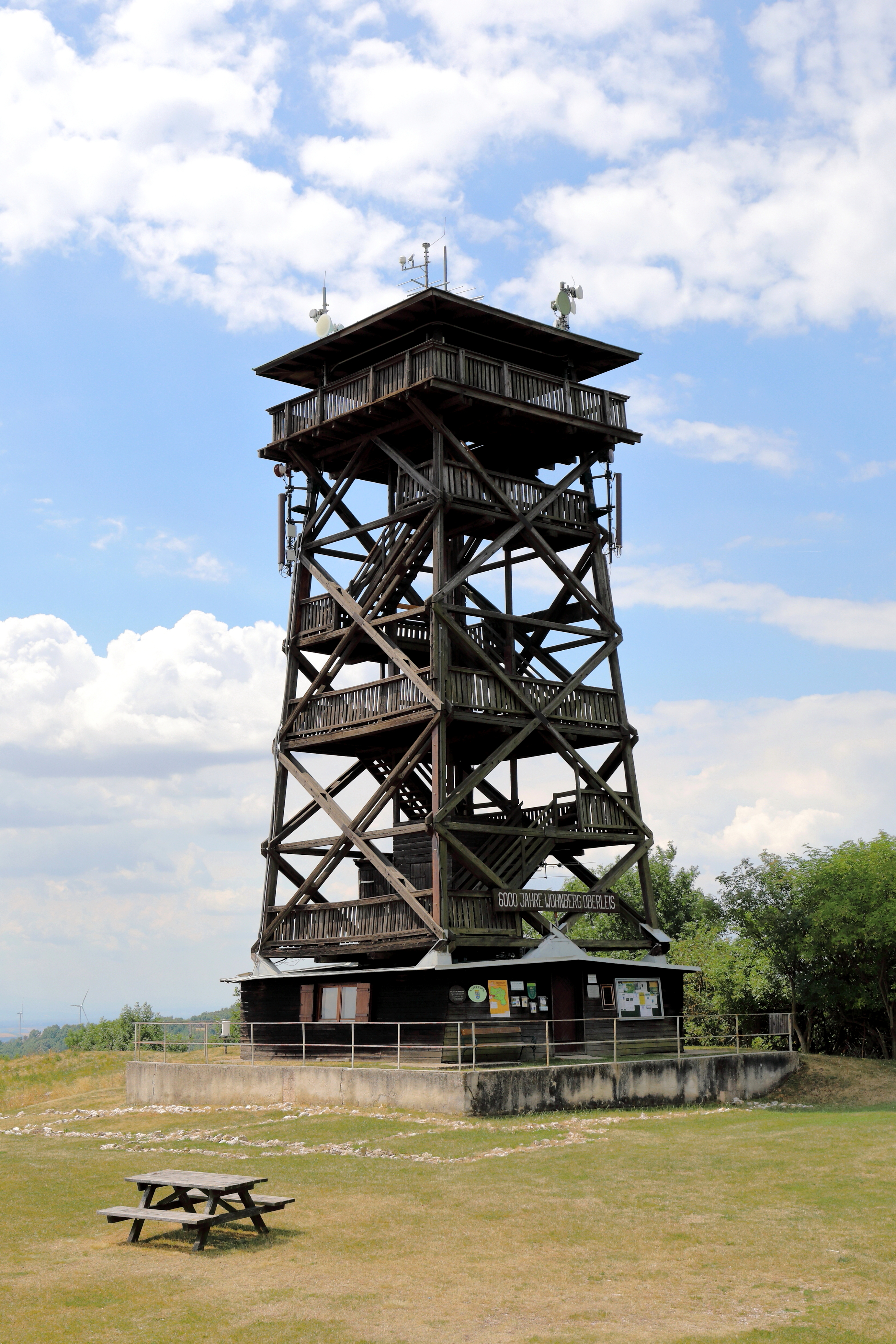 Der Aussichtsturm Oberleis auf dem 457 m hohen Oberleiser Berg in der niederösterreichischen Marktgemeinde Ernstbrunn. Der 23 m hohe Holzturm, der einem römischen Wachturm nachempfunden ist, wurde 1970 errichtet. Rund um den Aussichtsturm erstreckt sich ein Freilichtmuseum und im Inneren des Turms befindet sich seit 1986 eine Ausstellung über die Ausgrabungen und die 6000 Jahre Besiedlungsgeschichte des Bergplateaus.